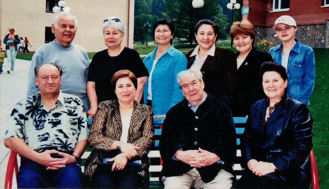 Мустай Карим в Красноусольске.